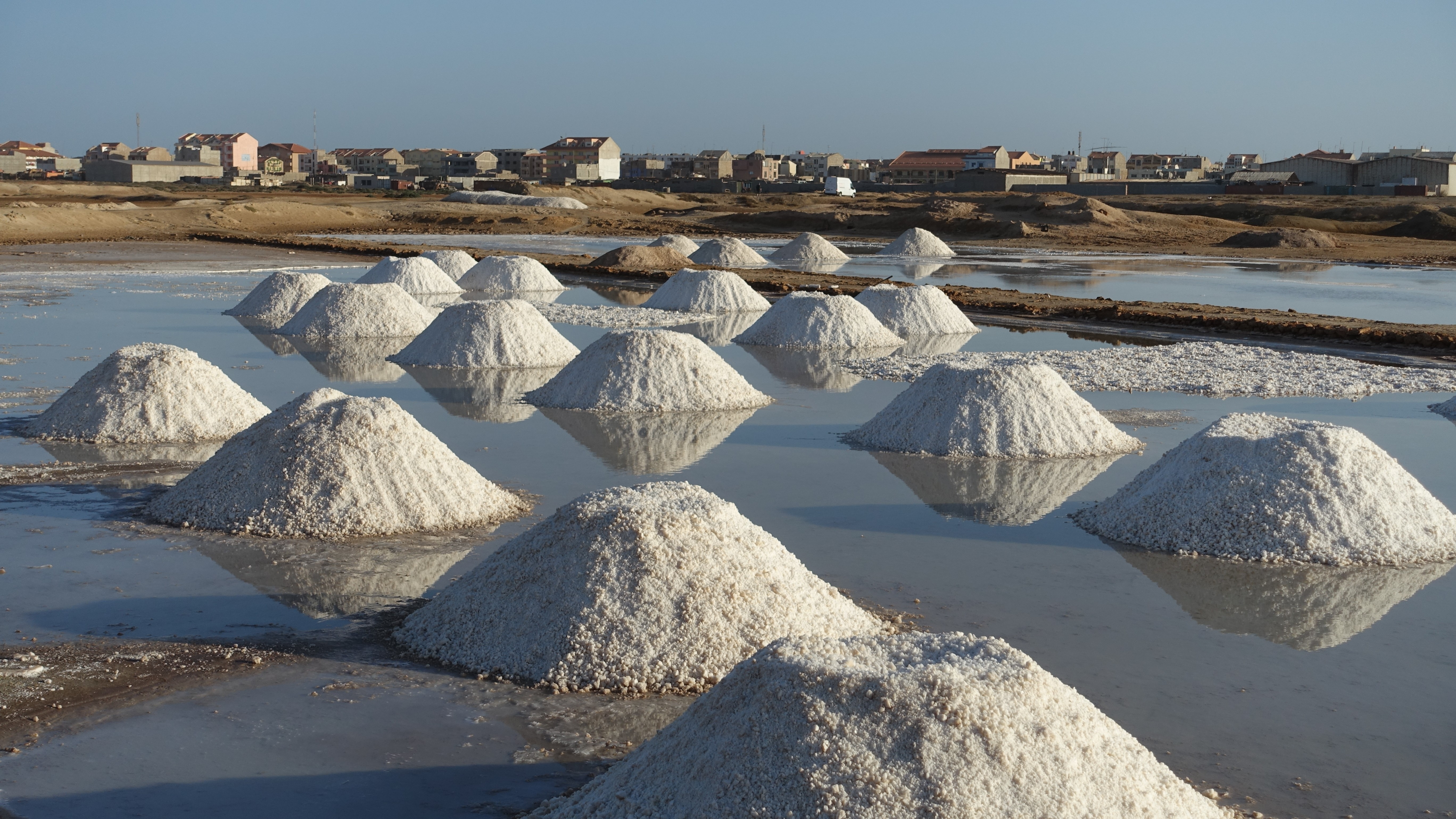 Santa Maria - Saline am Ortsrand_02